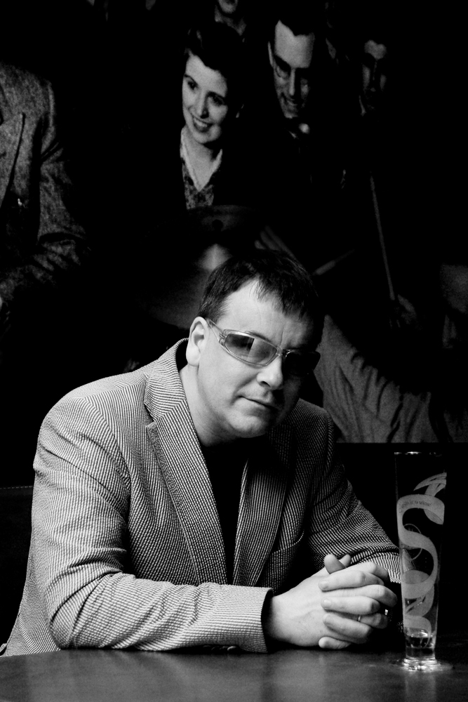 Arnis Mednis - 2008. Atklājot pirmo īsto džeza baudītāju vietu Rīgā, starp K.Barona un Tērbatas ielu, klubu Jazz.